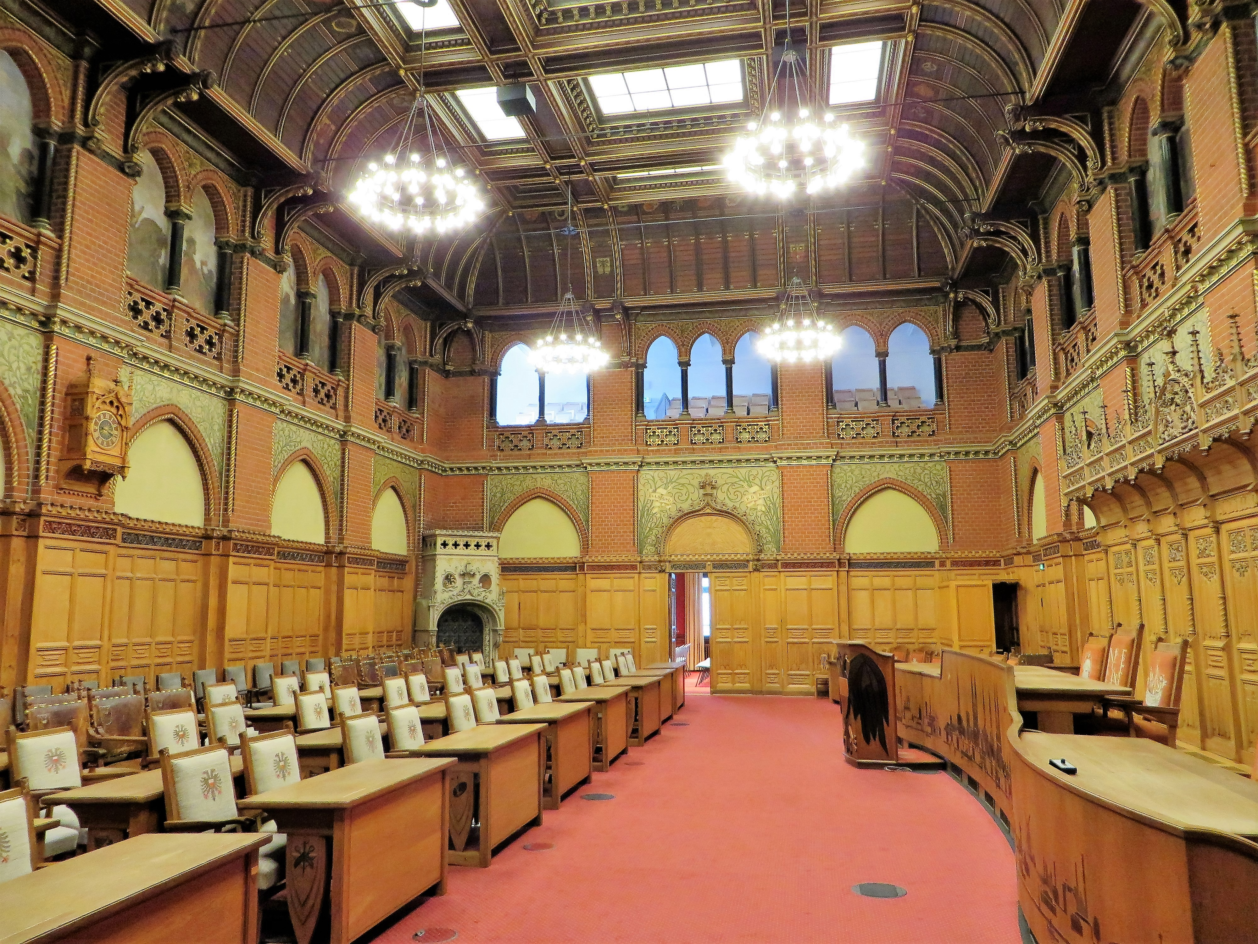 Bürgerschaftssaal im Lübecker Rathaus. 1891 im neugotischen Stil errichtet.